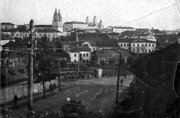 Беларуская (тарашкевіца): Менск (Miensk), вуліца Вялікая Барысаўская (vulica Vialikaja Barysaǔskaja). Направа Траецкае прадмесьце (Trajeckaje pradmieściе)